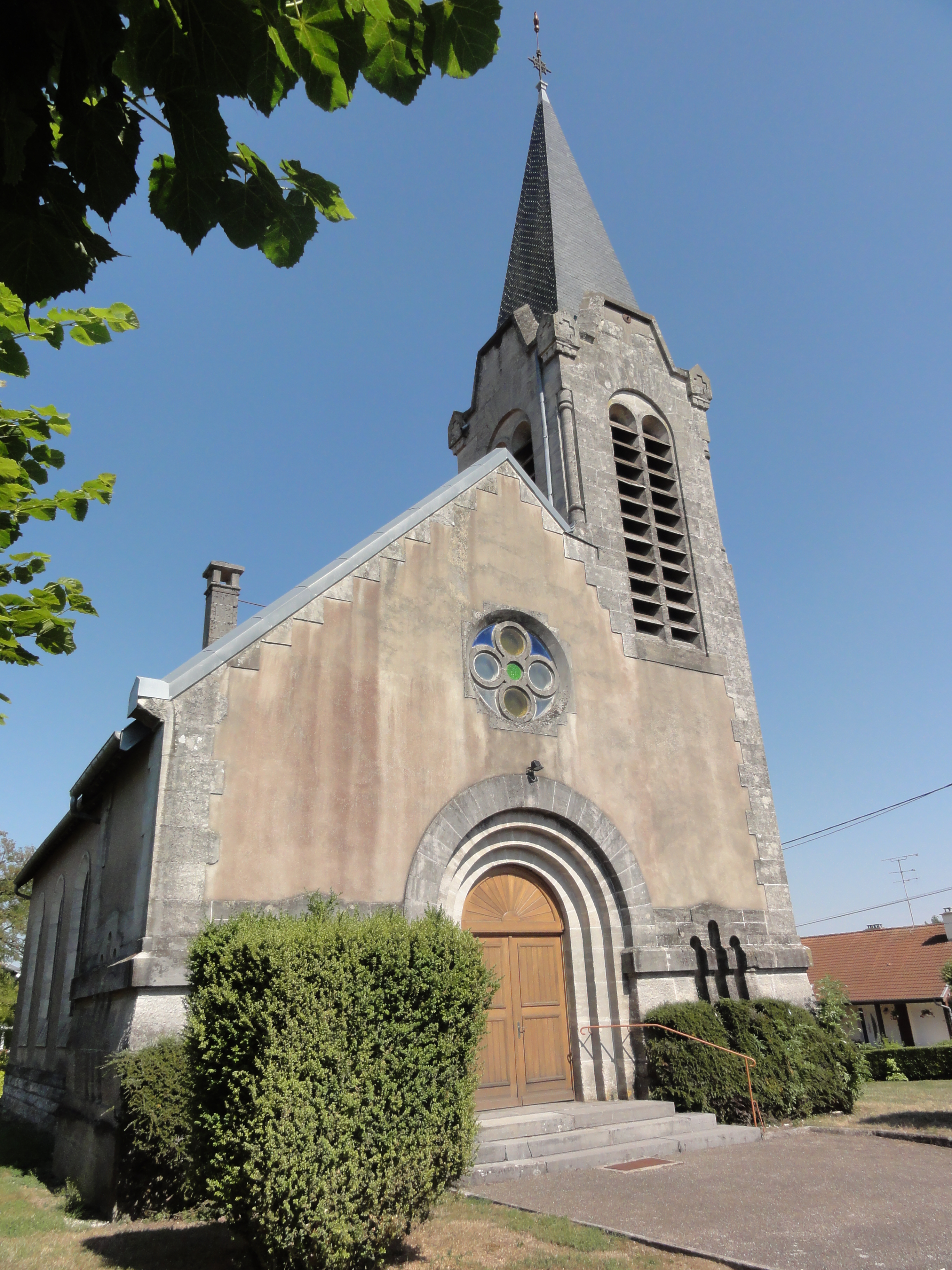 Montzéville (Meuse) église